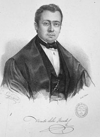 Título: Retrato de Vicente de la Fuente / C. Legrand Publicación: [Madrid] : Lit. de J. Donon , [1865] 1 estampa : litografía ; irreg. 142 x 134 mm Car. físicas: Litografías-España-S.XIX Notas: Facs. del autógrafo: "Vicente dela Fuente" Estampa suelta de: España sagrada, continuada por la Real Academia de la Historia. Tomo 49, La santa iglesia de Tarazona ..., 1865 Iconografía Hispana 3354-1 - Barcia Retratos conservados en la B.N. 708 - Páez. Repertorio 1185-14